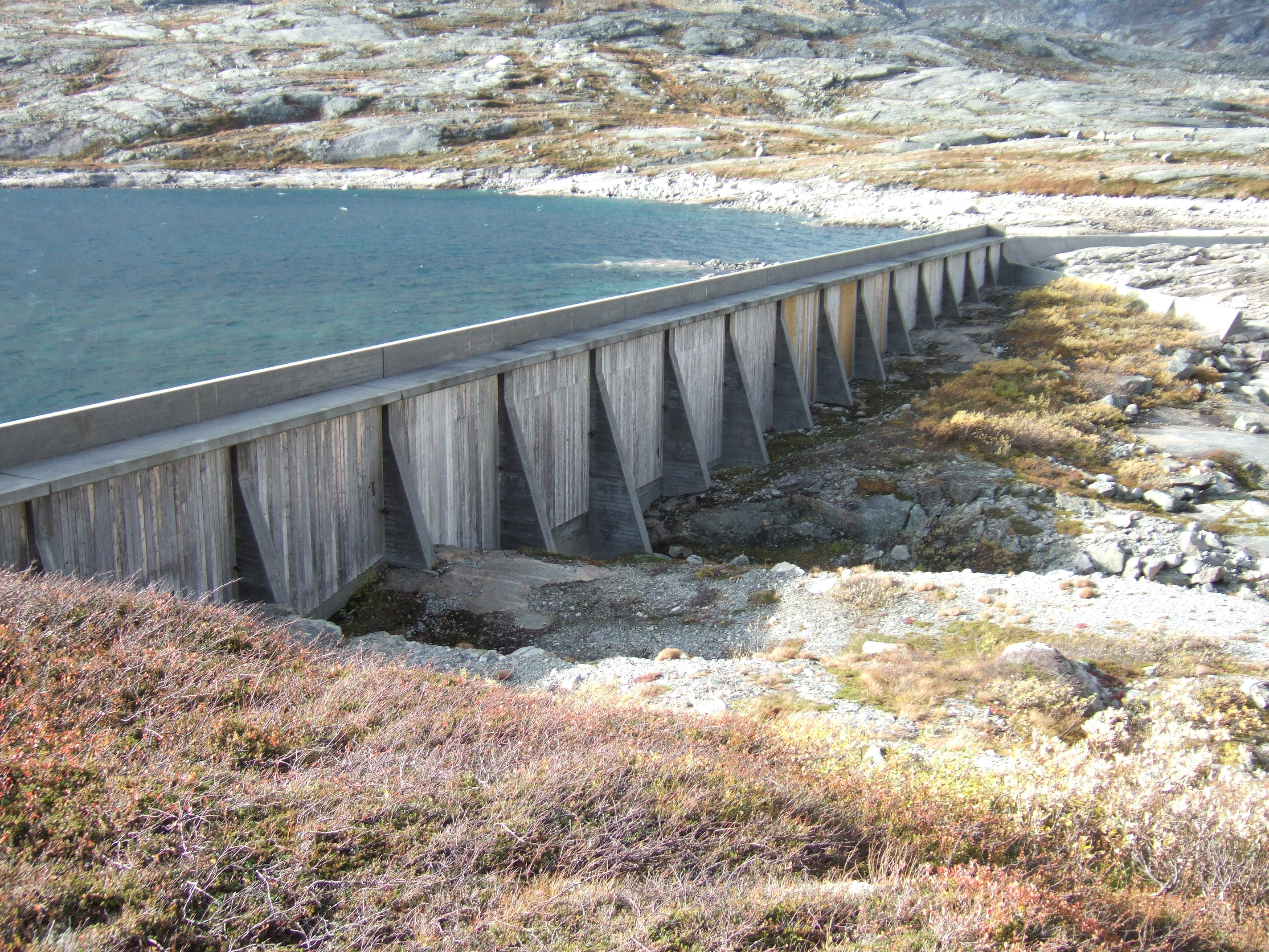 Fitvatnet dam, Nordal.